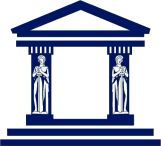 Ayudándome de paint y una imágen de un archivo PDF del poder judicial, hice el logo para utilizarlo en wikipedia. Espero sirva.